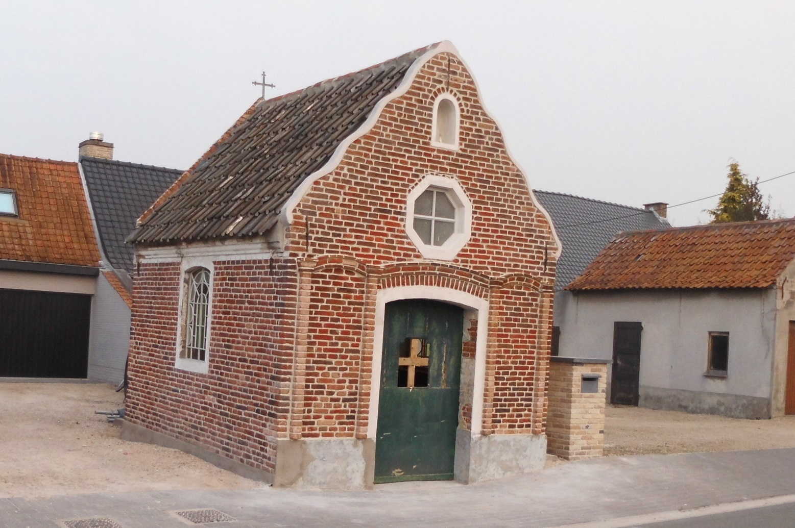 Mariakapel - Vrekkemstraat - Ursel - Knesselare - Oost-Vlaanderen - België